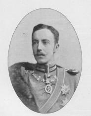 Ks. Fryderyk von Hessen-Kassel, r. 1895